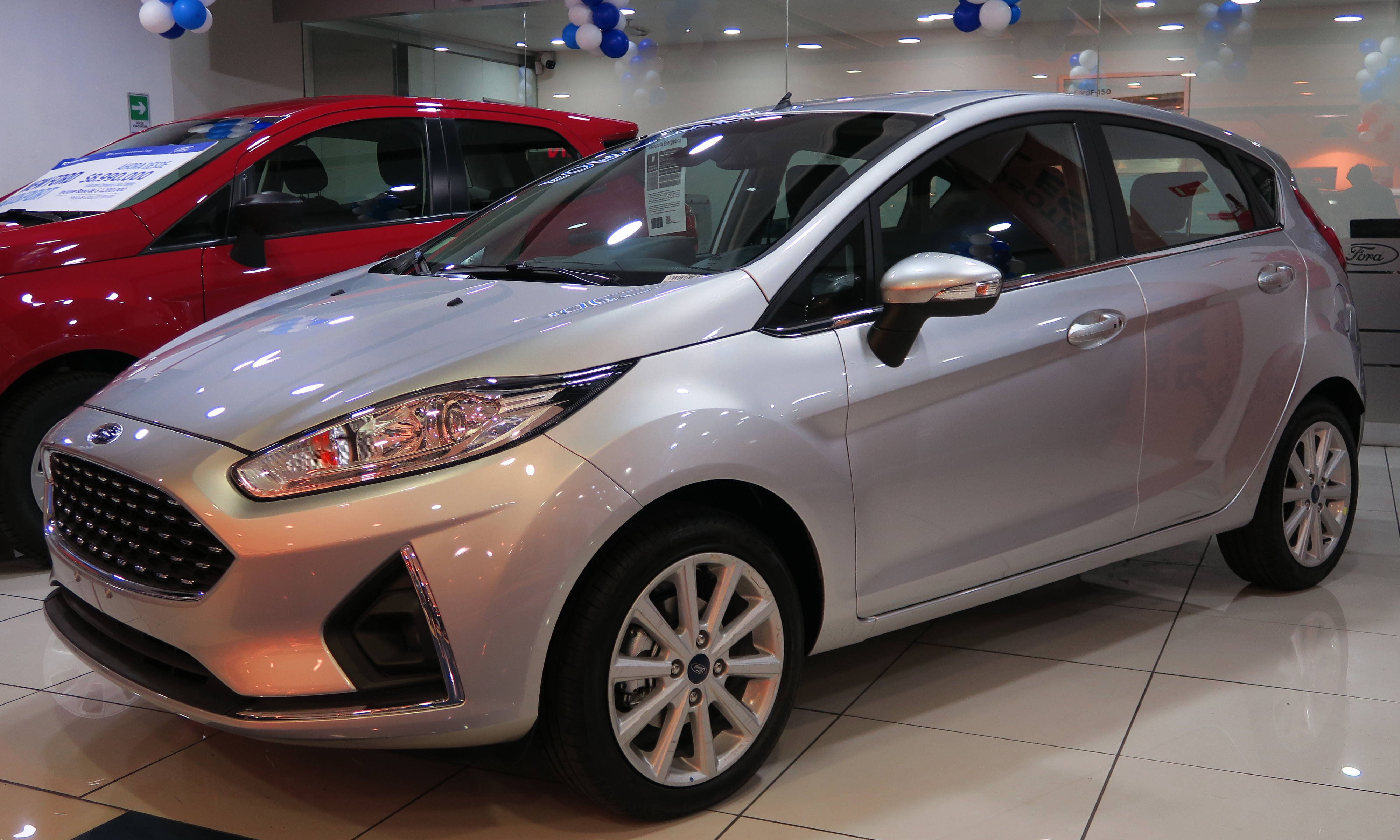 Ford Fiesta 1.6 Titanium 2018